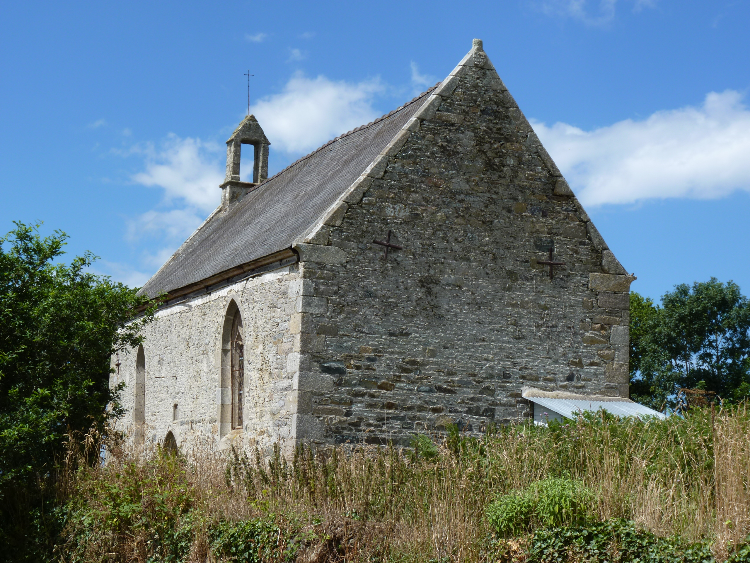 Chapelle du 15ème siècle